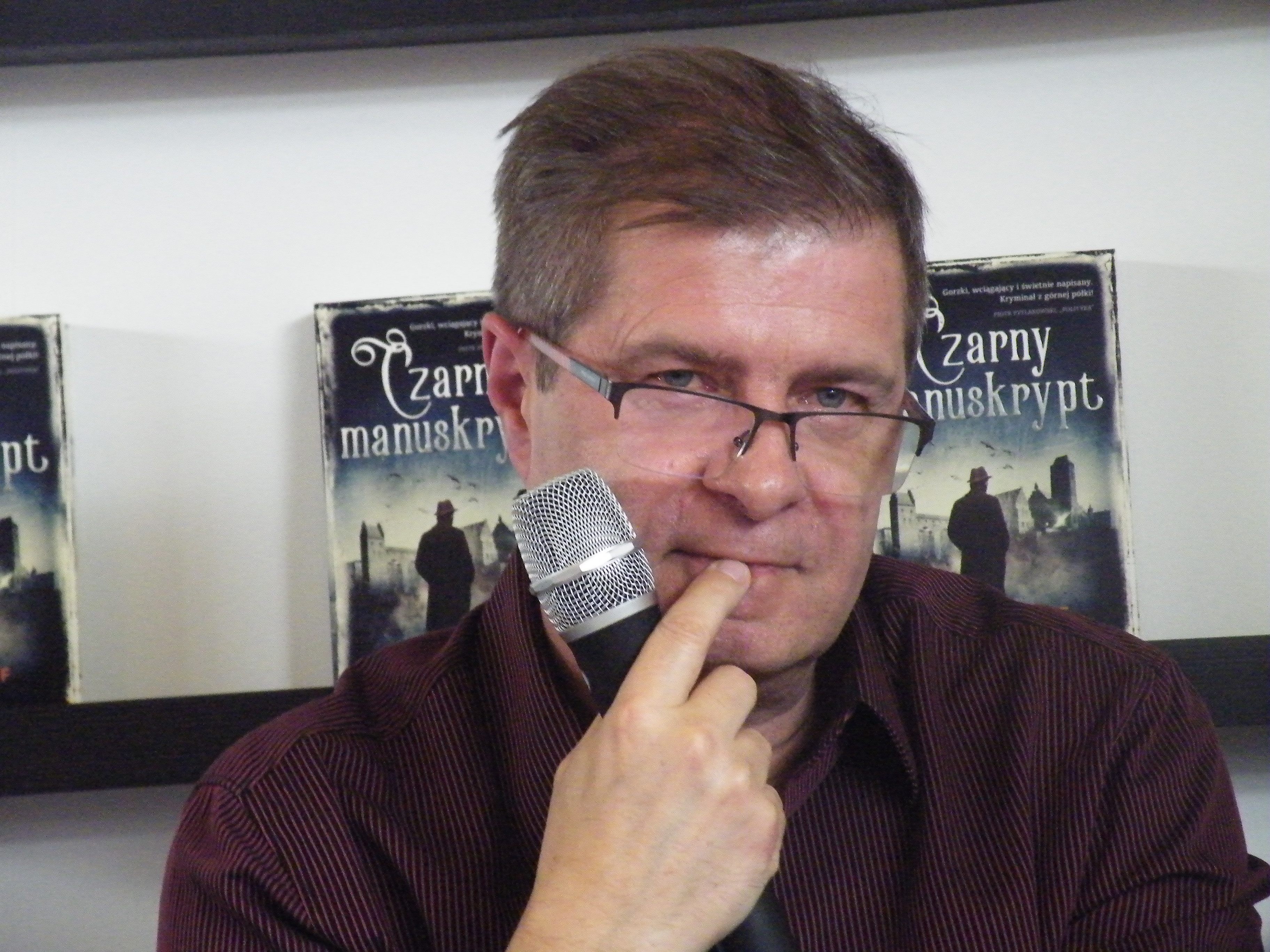 Dziennikarz i pisarz Krzysztof Bochus podczas pierwszego spotkania autorskiego, promującego powieść "Czarny manuskrypt".